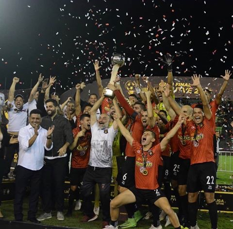 Caracas Fútbol Club alzando el título número 12 en Primera División al vencer en penaltis a Estudiantes de Mérida.